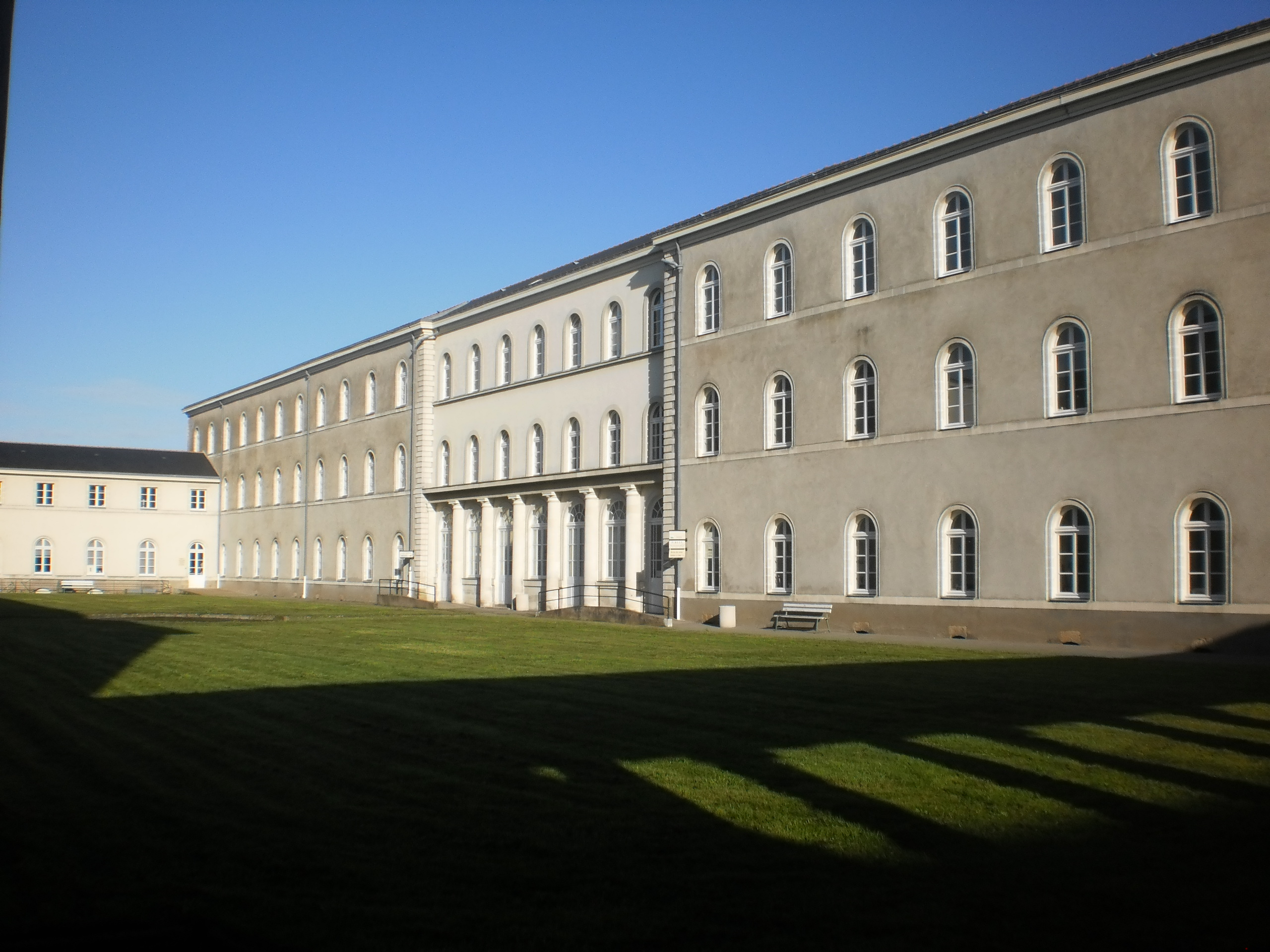 Bâtiments centraux de l'hôpital Saint-Jacques de Nantes (France)